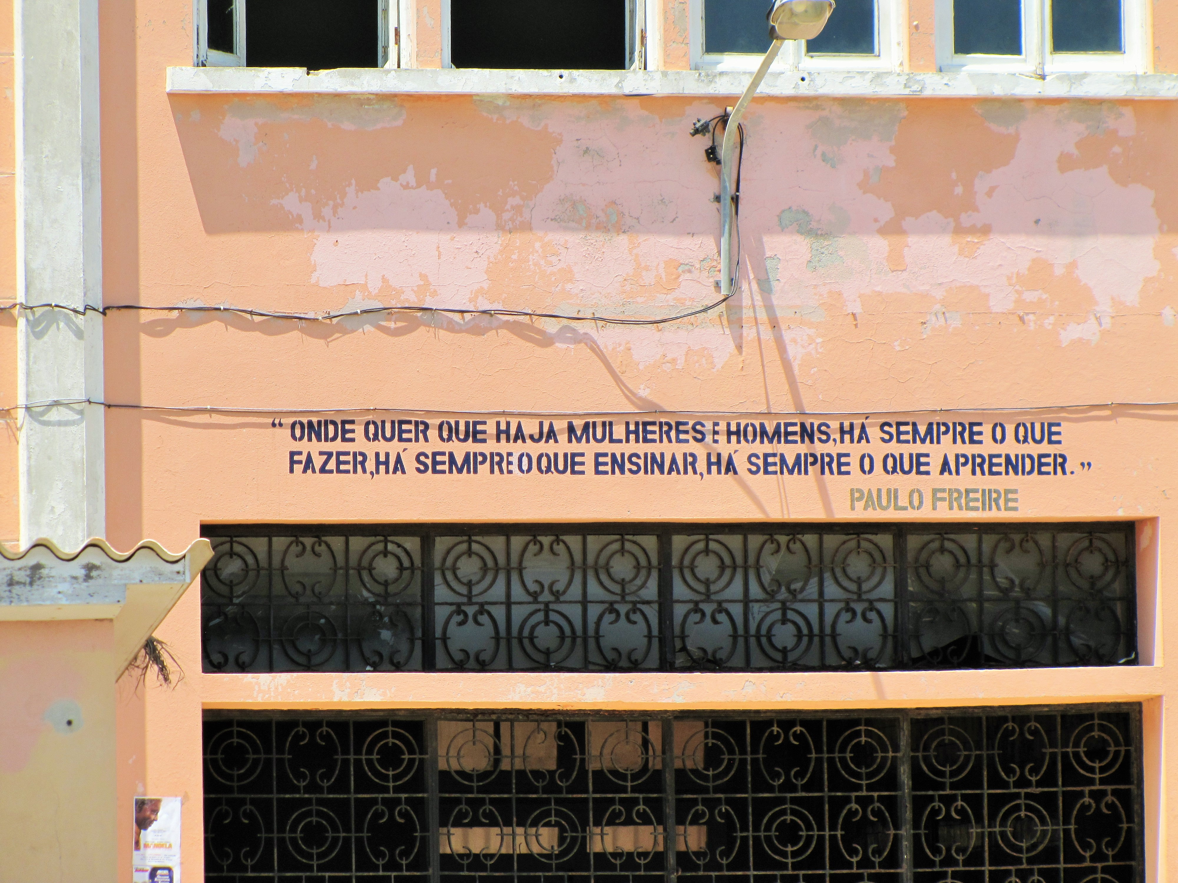 Sao Tome Liceu Nacional Paulo Freire